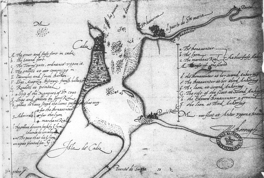 Plano de Francis Drake en el ataque de Cádiz, en 1587.